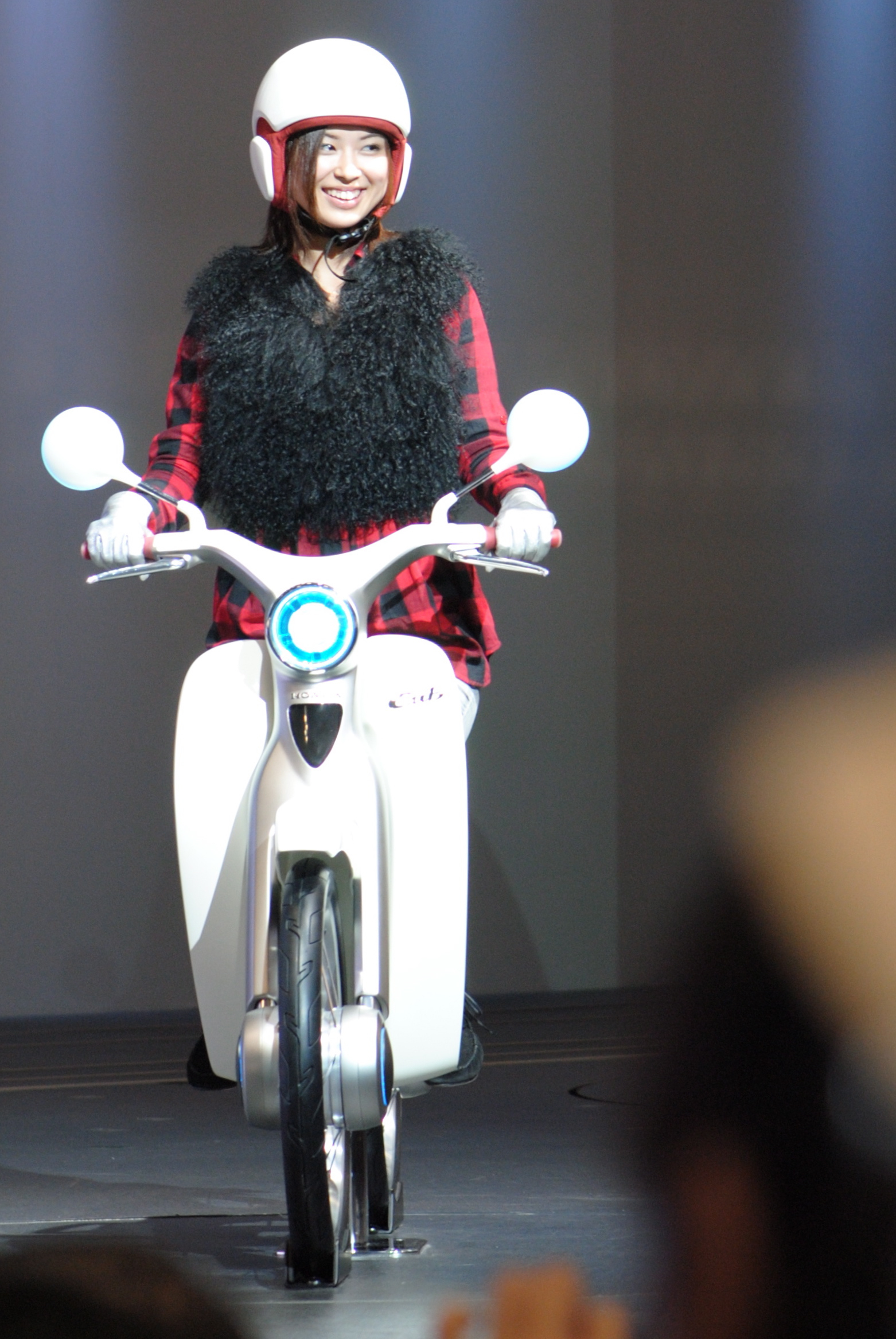 Honda EVCub